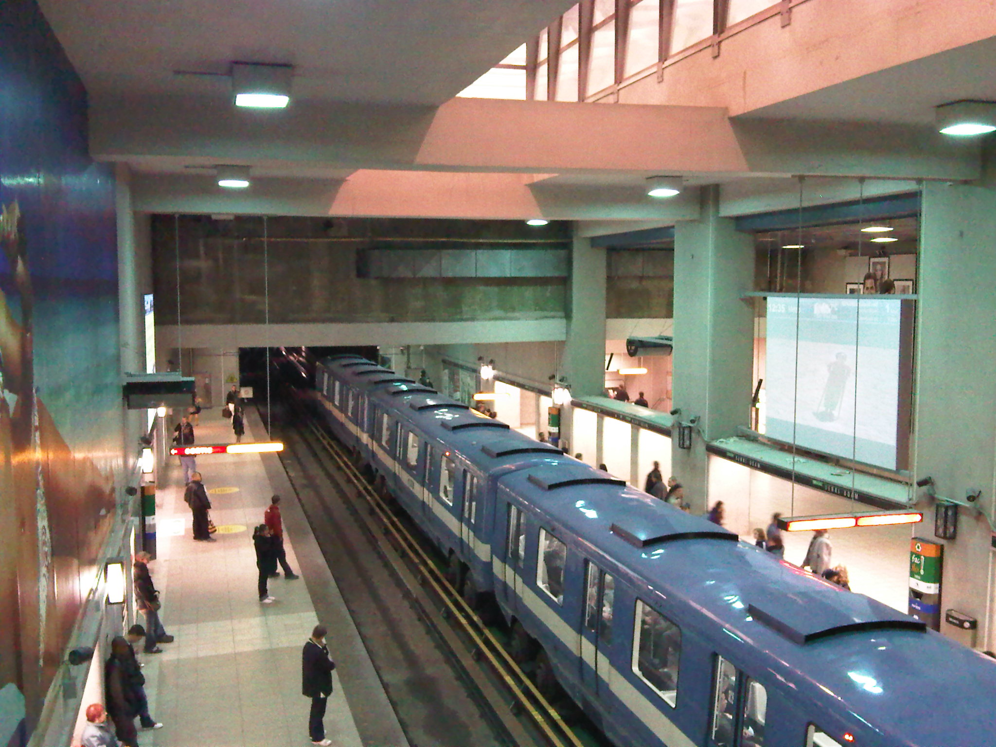 Berri-UQàM station